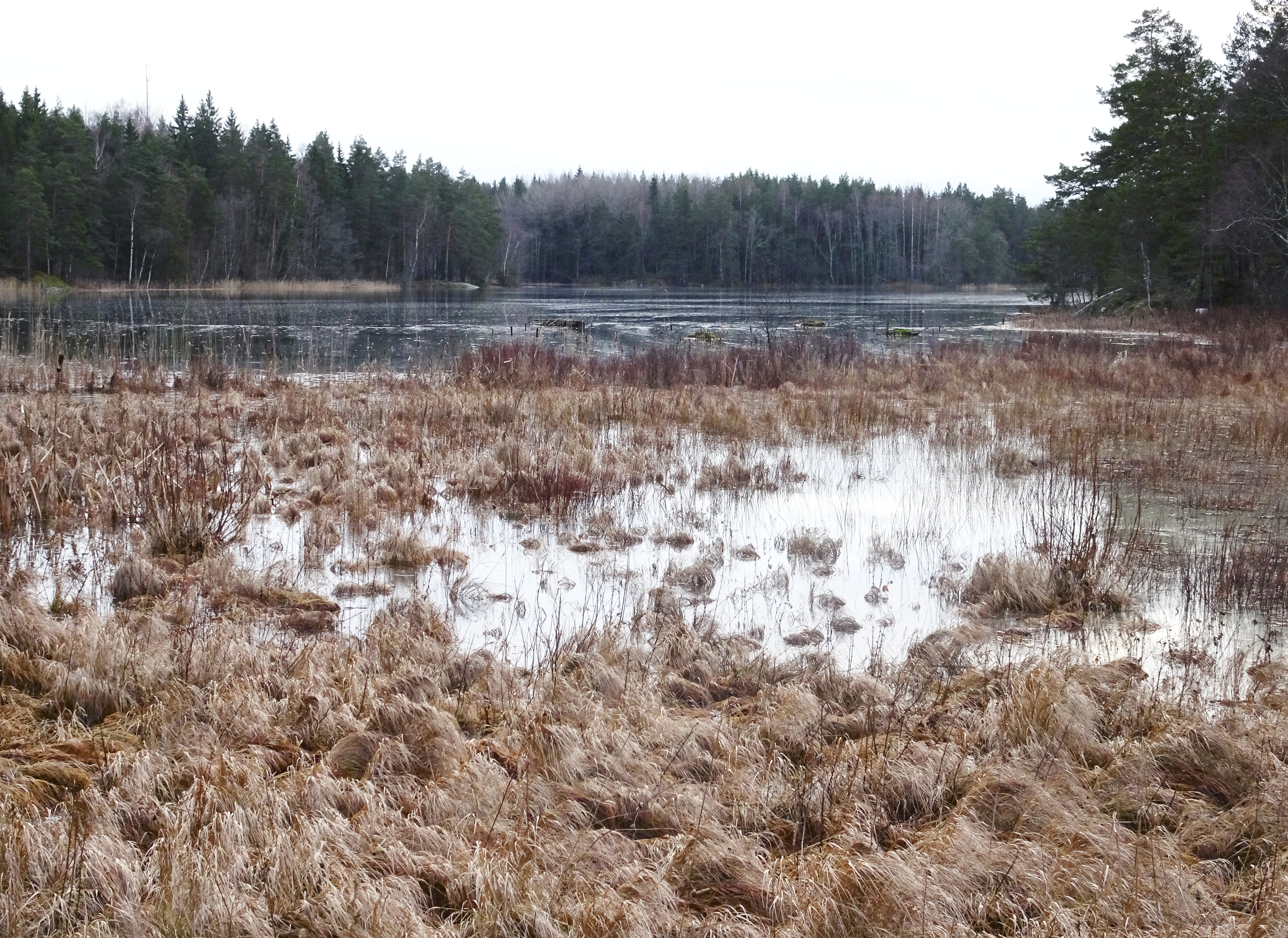 Träsksjön, Haninge, sedd från norr